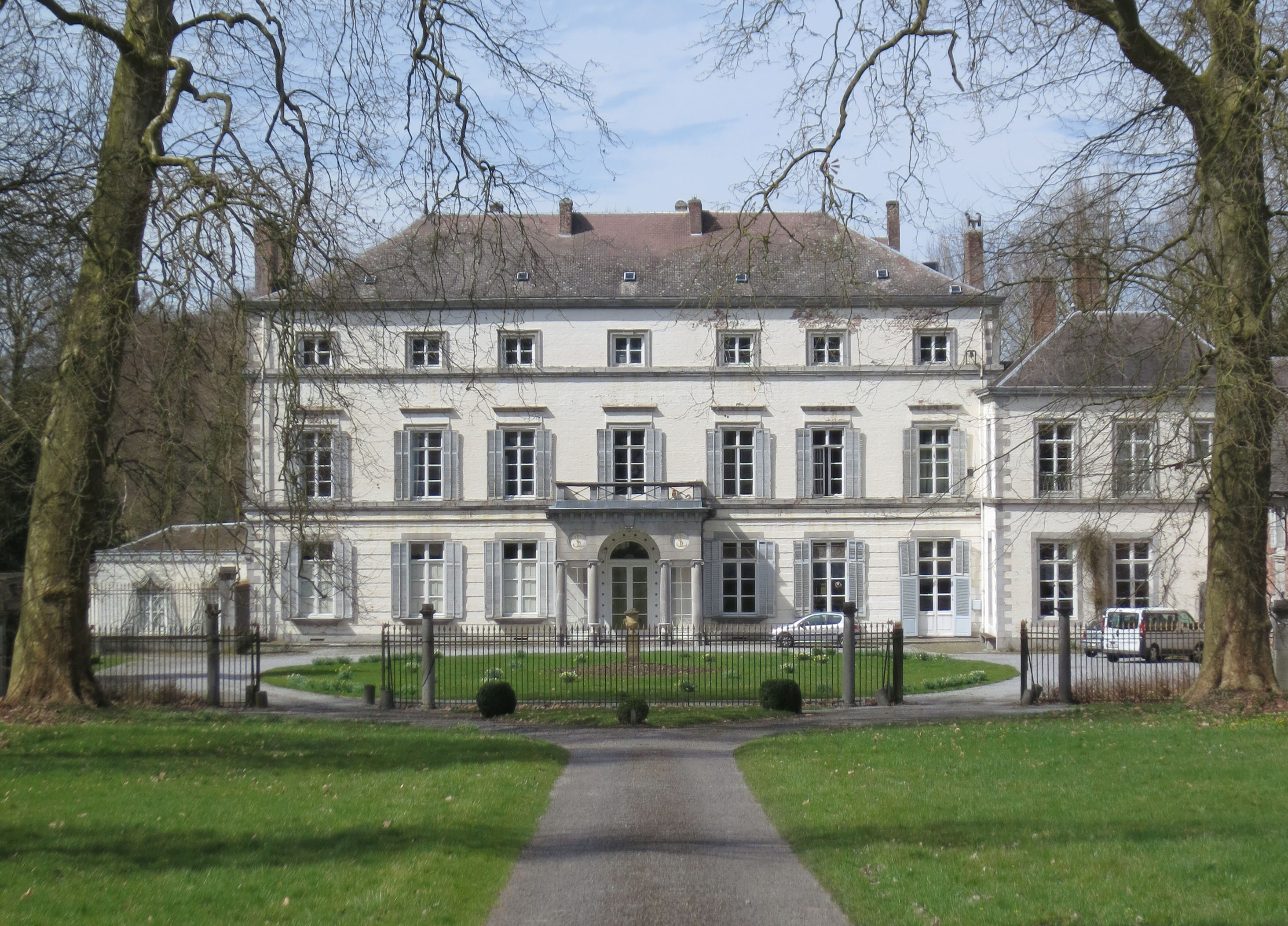 Waremme